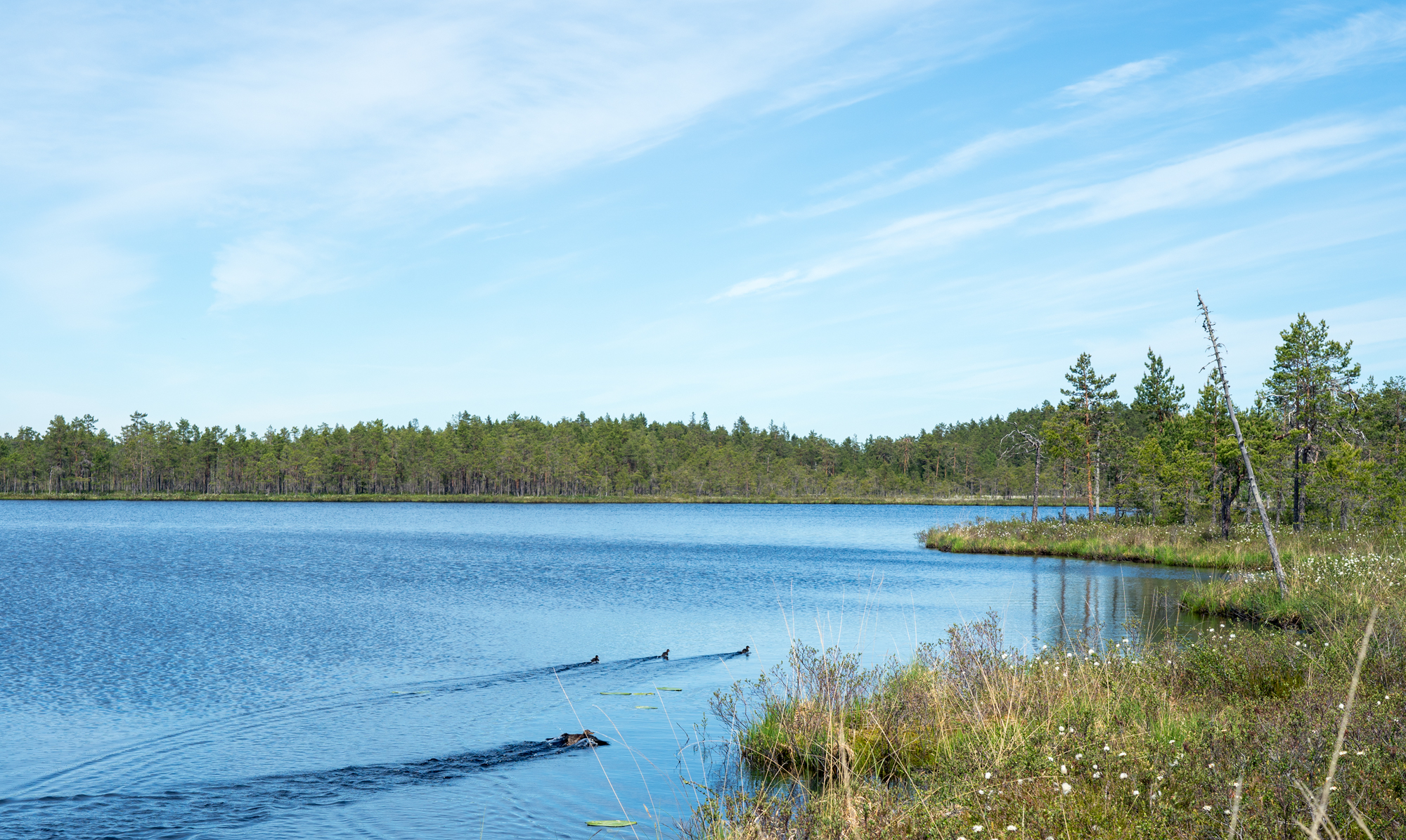 Håvtjärnen.